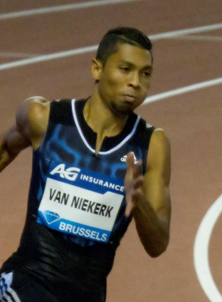 Wayde van Niekerk during Memorial Van Damme 2015, Brussels.